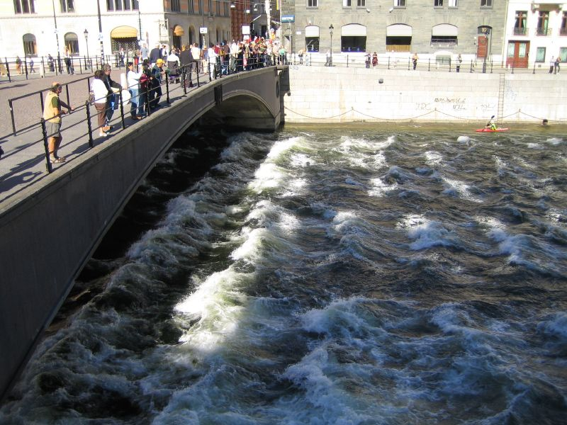 Riksbron, Stockholm